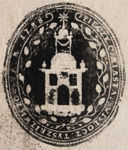 Беларуская (тарашкевіца): Сьвіслач (Śvisłač). Мескі герб на пячаці